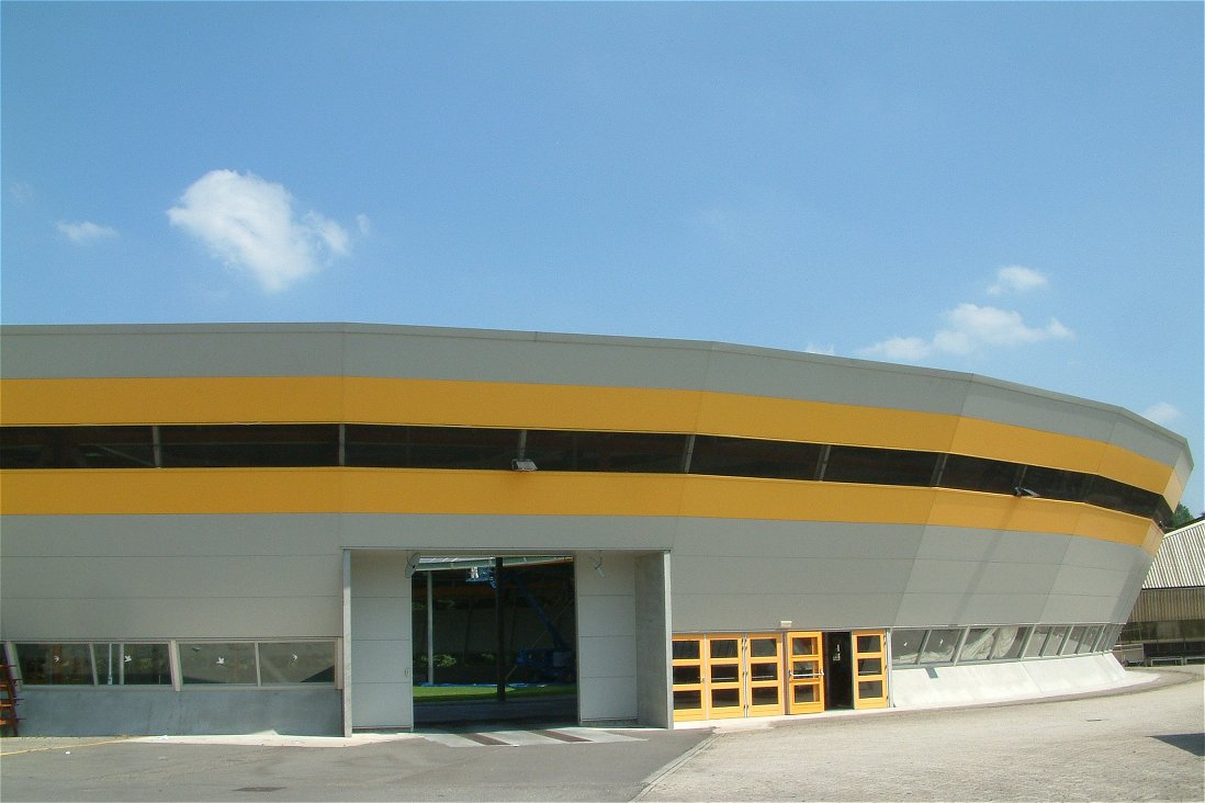 IJssportcentrum Eindhoven in Eindhoven (Genneper Parken)